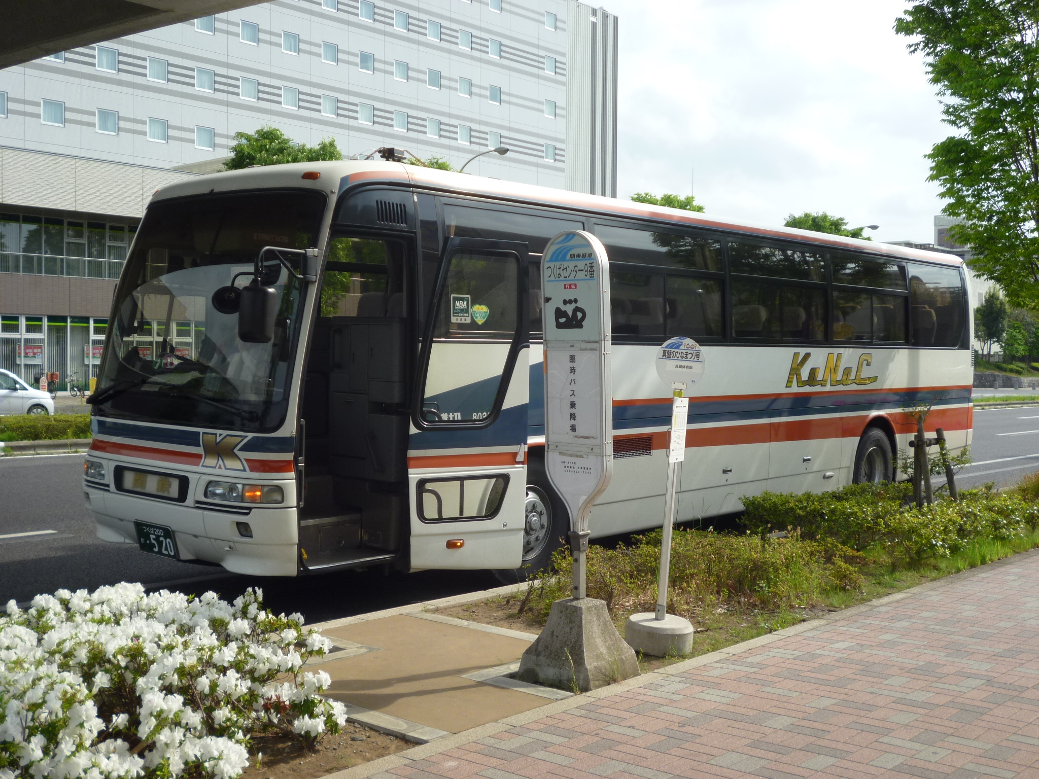 つくばセンター9番乗り場に到着した真壁のひなまつり号。車両は関鉄観光バスの8038SD。車種は三菱ふそう・エアロバスKL-MS86MP？